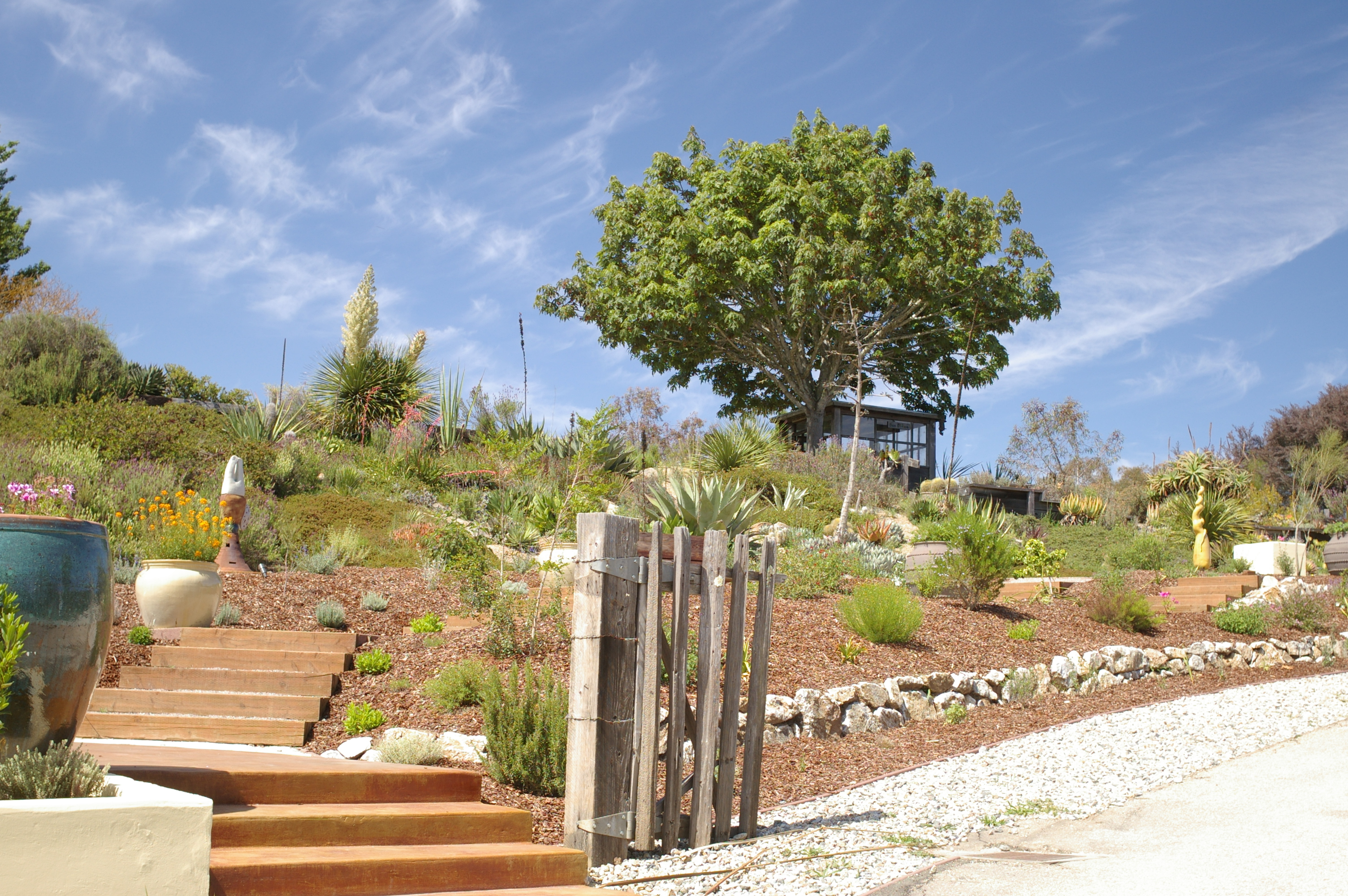 Arboretum, UCSC